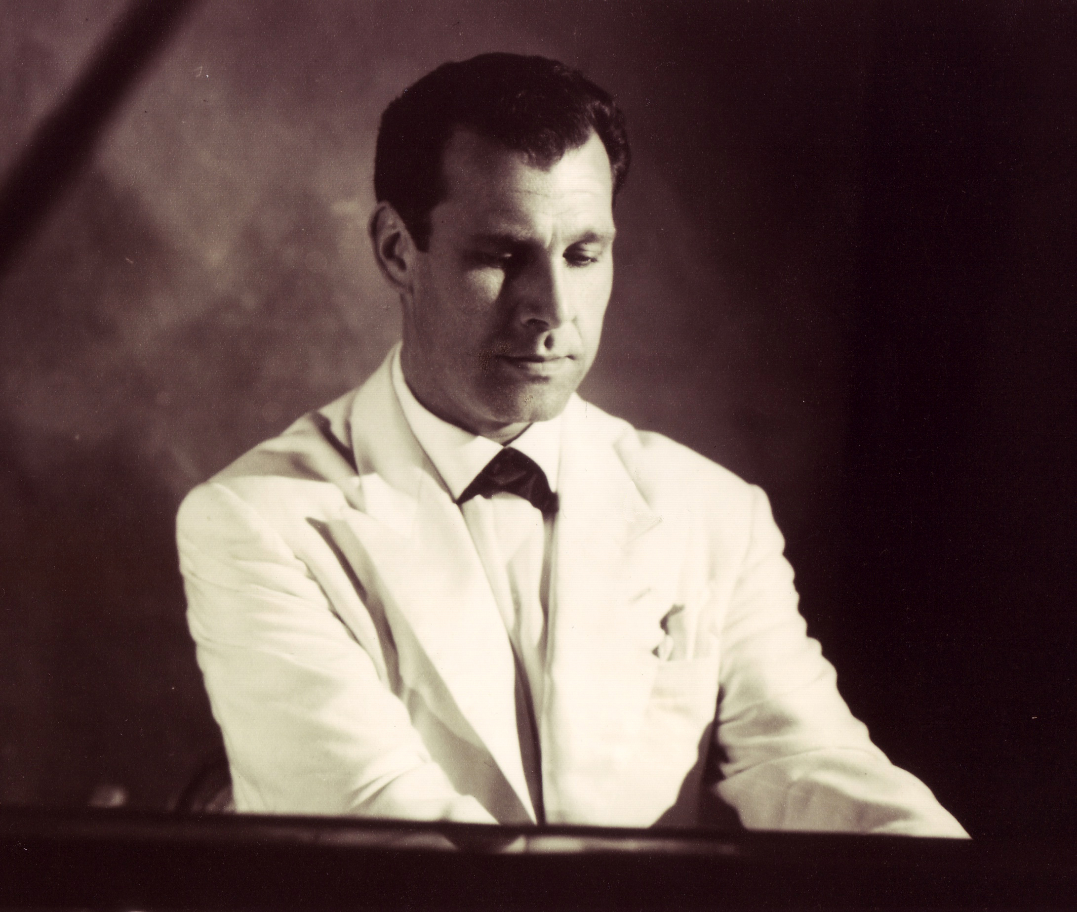 pianiste Yury Boukoff